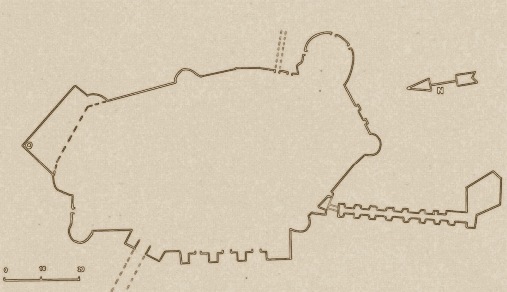 Umrissplan von Burg Hunedoara (Rumänien)